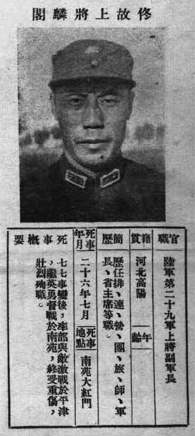 抗戰軍人忠烈錄第一輯中的烈士遺像